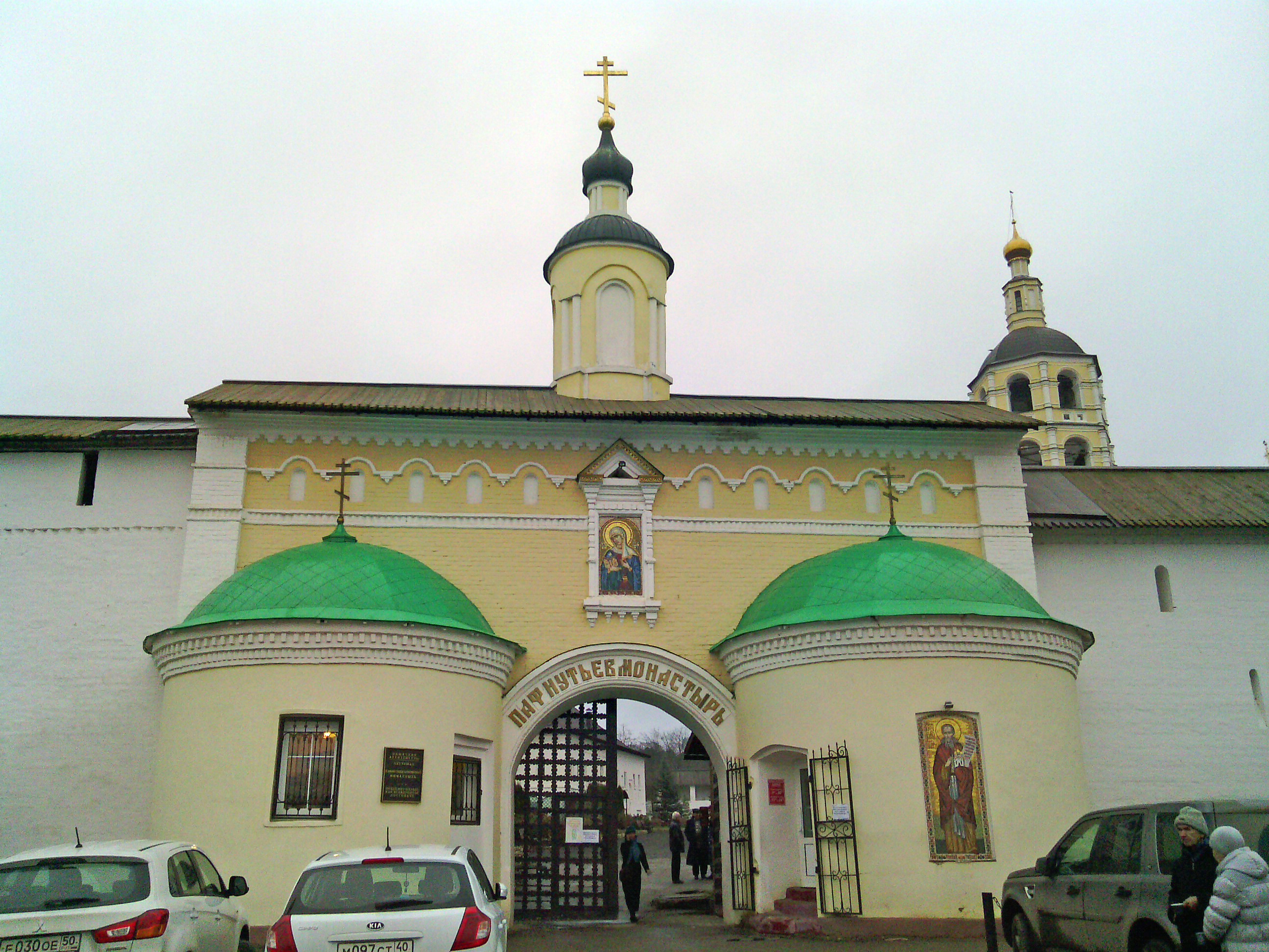 Свято-Пафнутиев Боровский мужской монастырь. Проломные ворота. XVIII-XIX века.